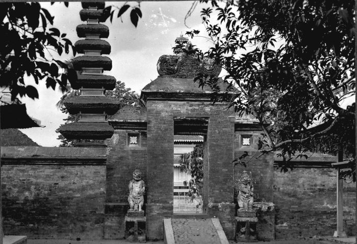 Foto. Herinnering aan het bezoek van Z.E. den Gouverneur Generaal Mr. D. Fock aan Lombok 6/8 April 1925. De ingang tot de Poera Meroe te Tjakranegara op het eiland Lombok